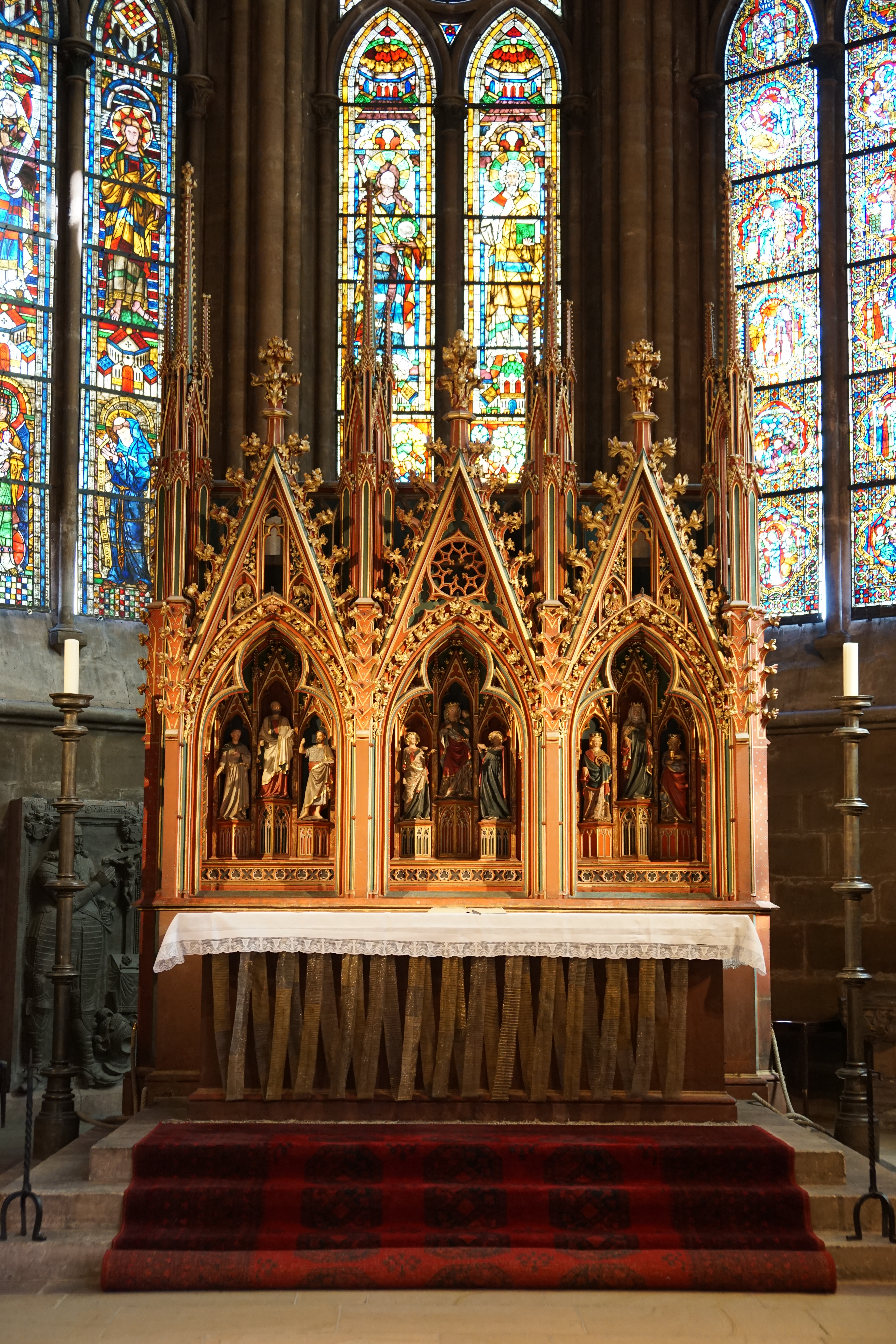 Siehe Dateiname